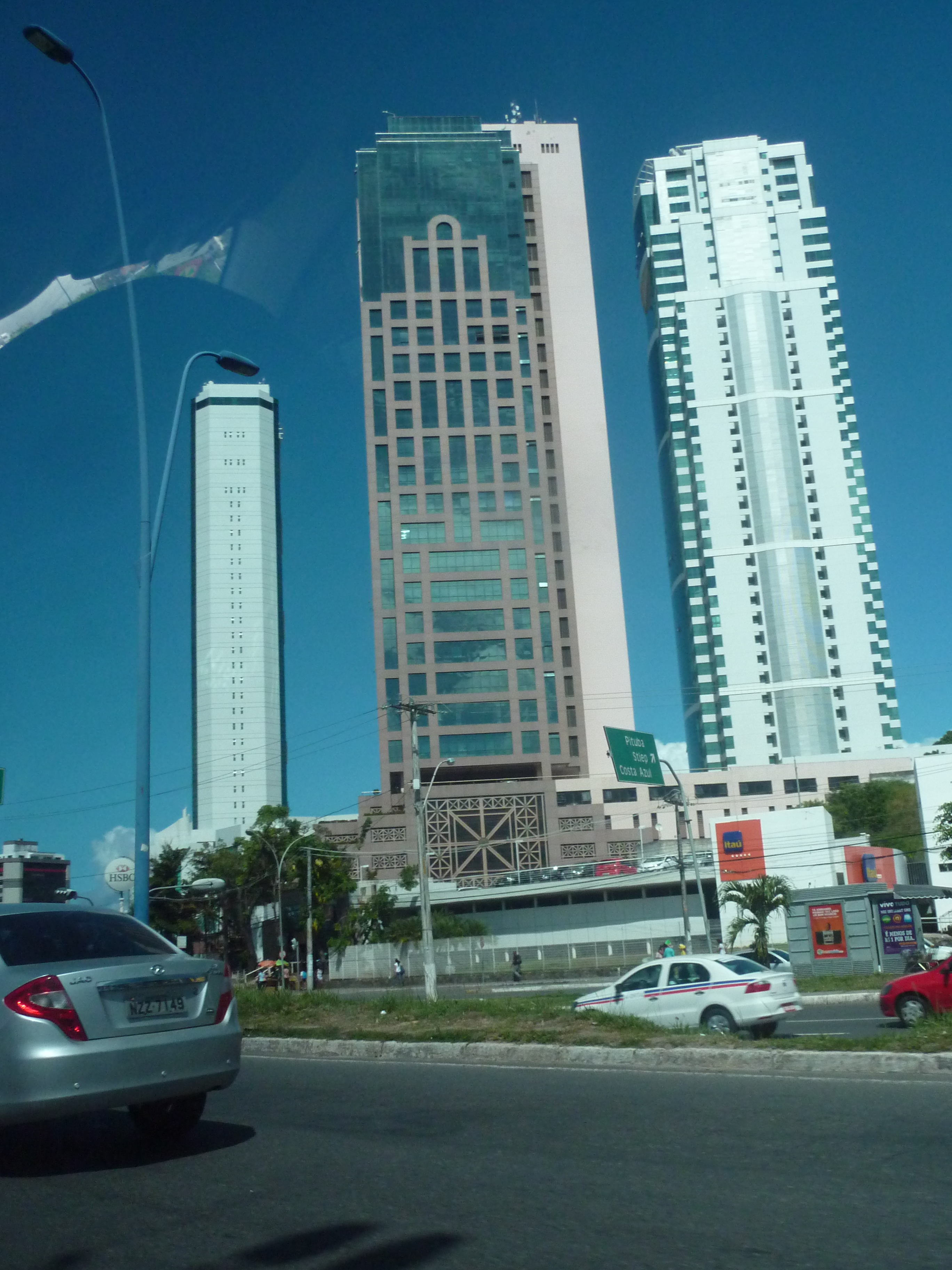 Edifício Suarez Trade ao centro e as duas torres do Mundo Plaza nas laterais, todos situados na Avenida Tancredo Neves, Salvador, Bahia, Brasil, em março de 2014.